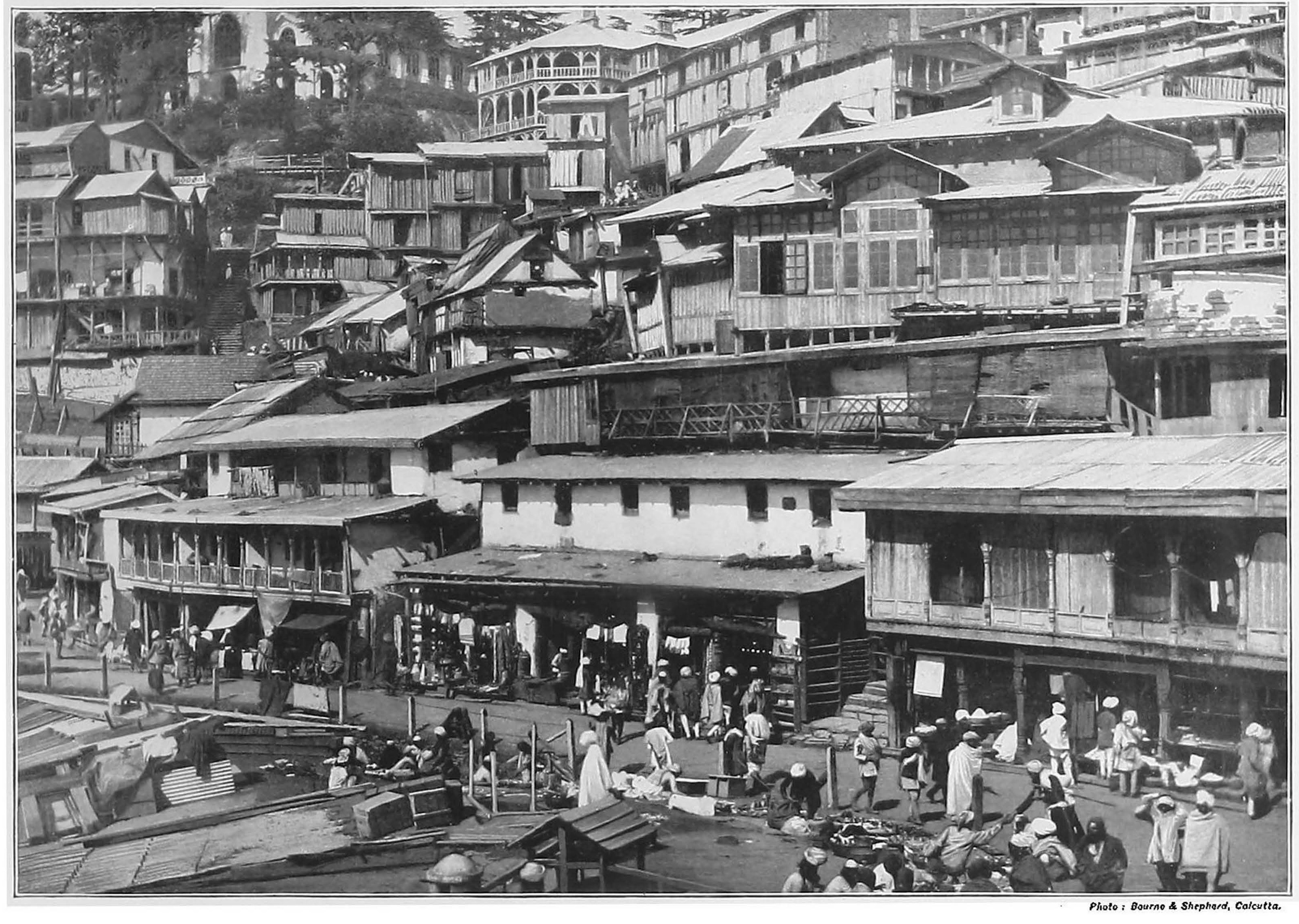 Lower Bazaar, Simla